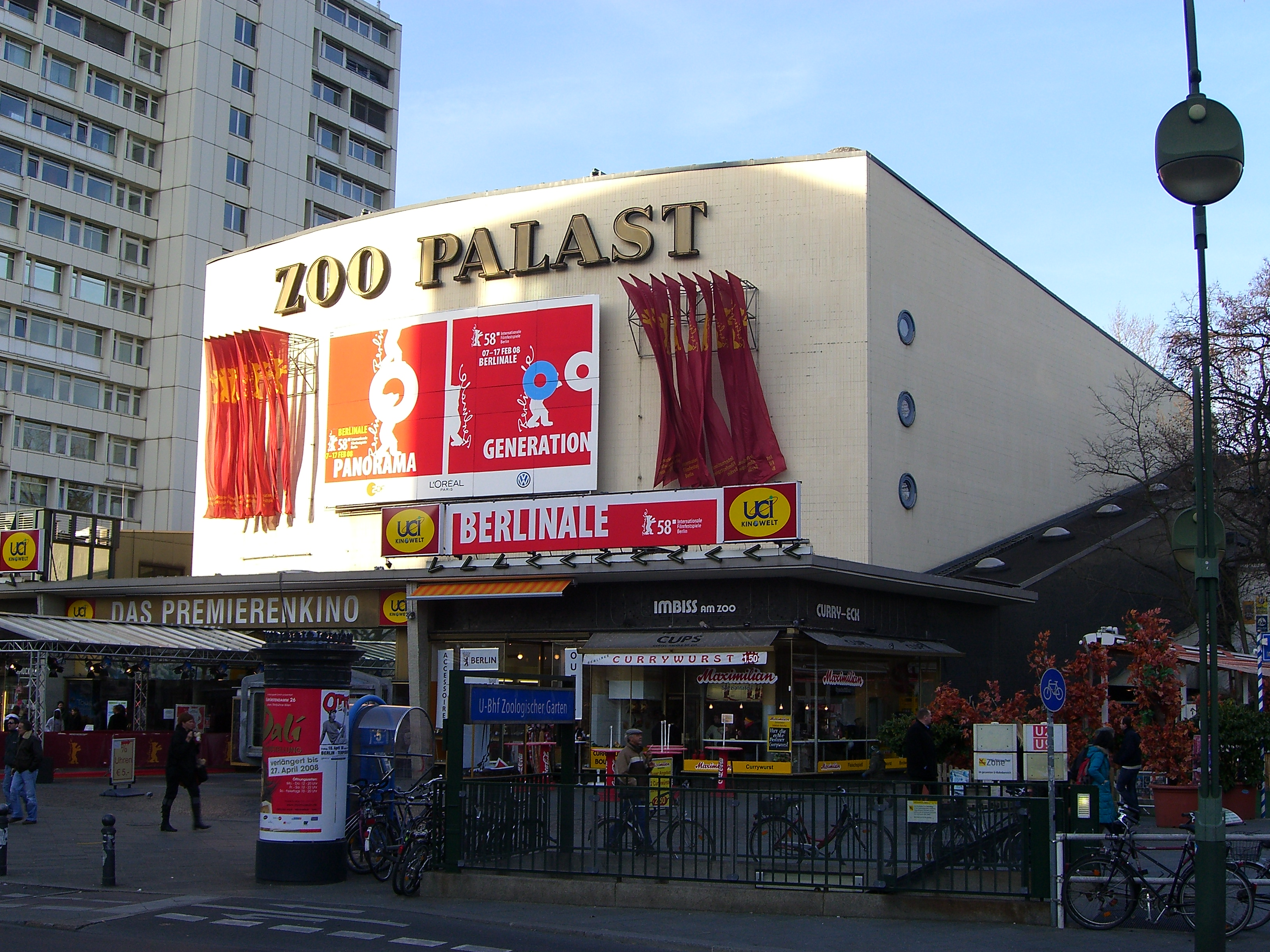 Zoo-Palast während der Berlinale 2008.